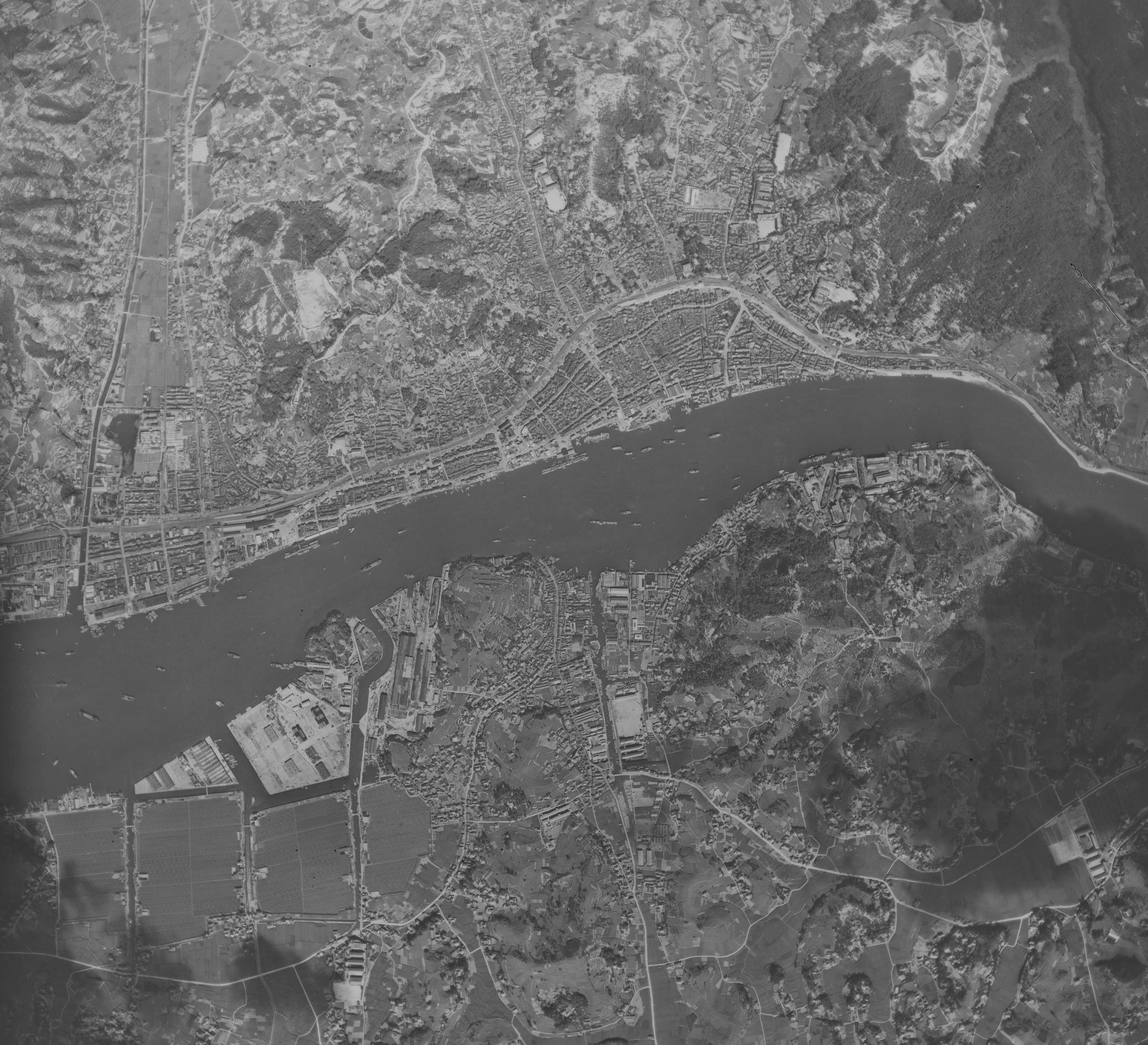 1947年米軍撮影の尾道市